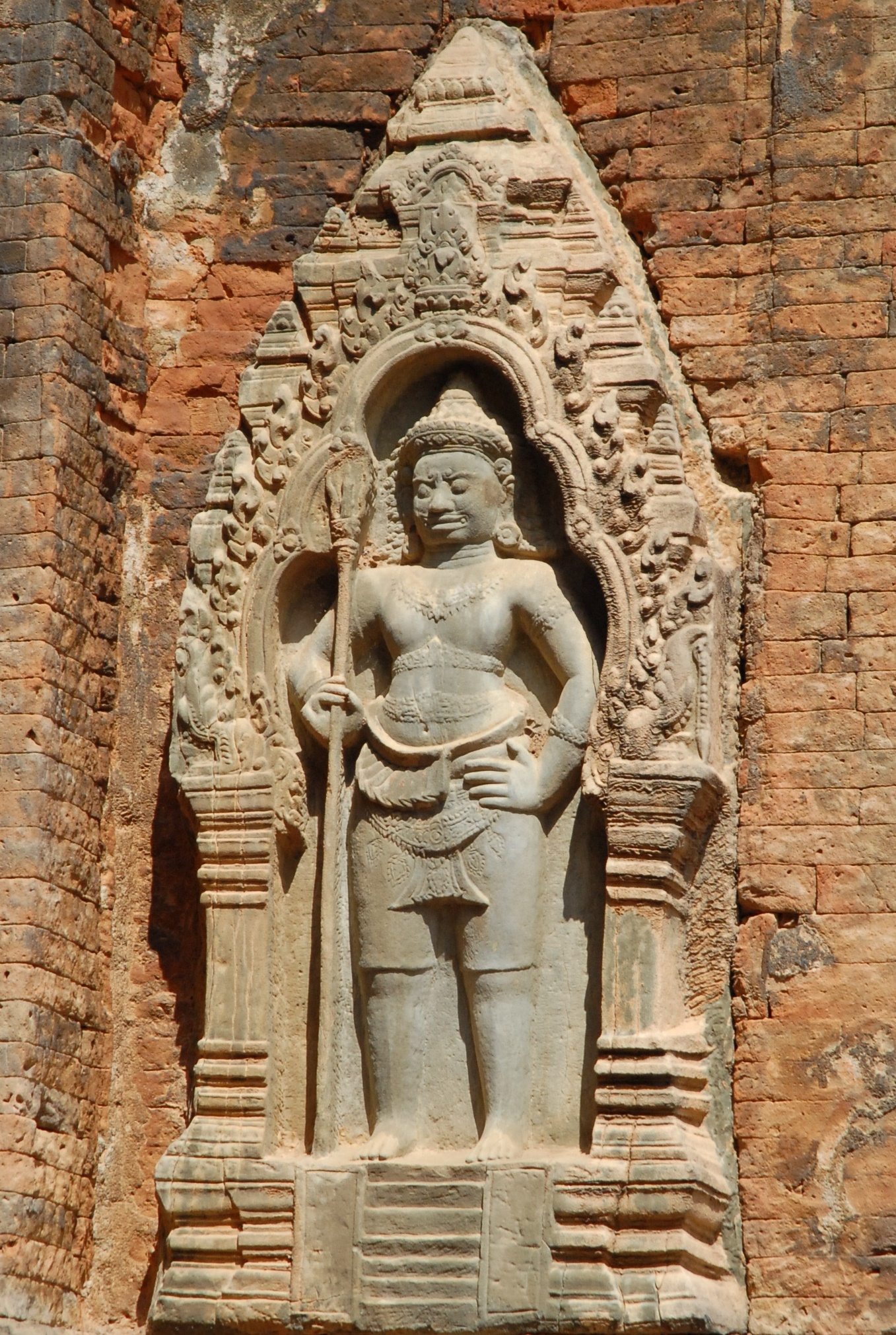 Cambodge, site archéologique d'Angkor, temple de Lolei : sculpture en grès, représentant un gardien